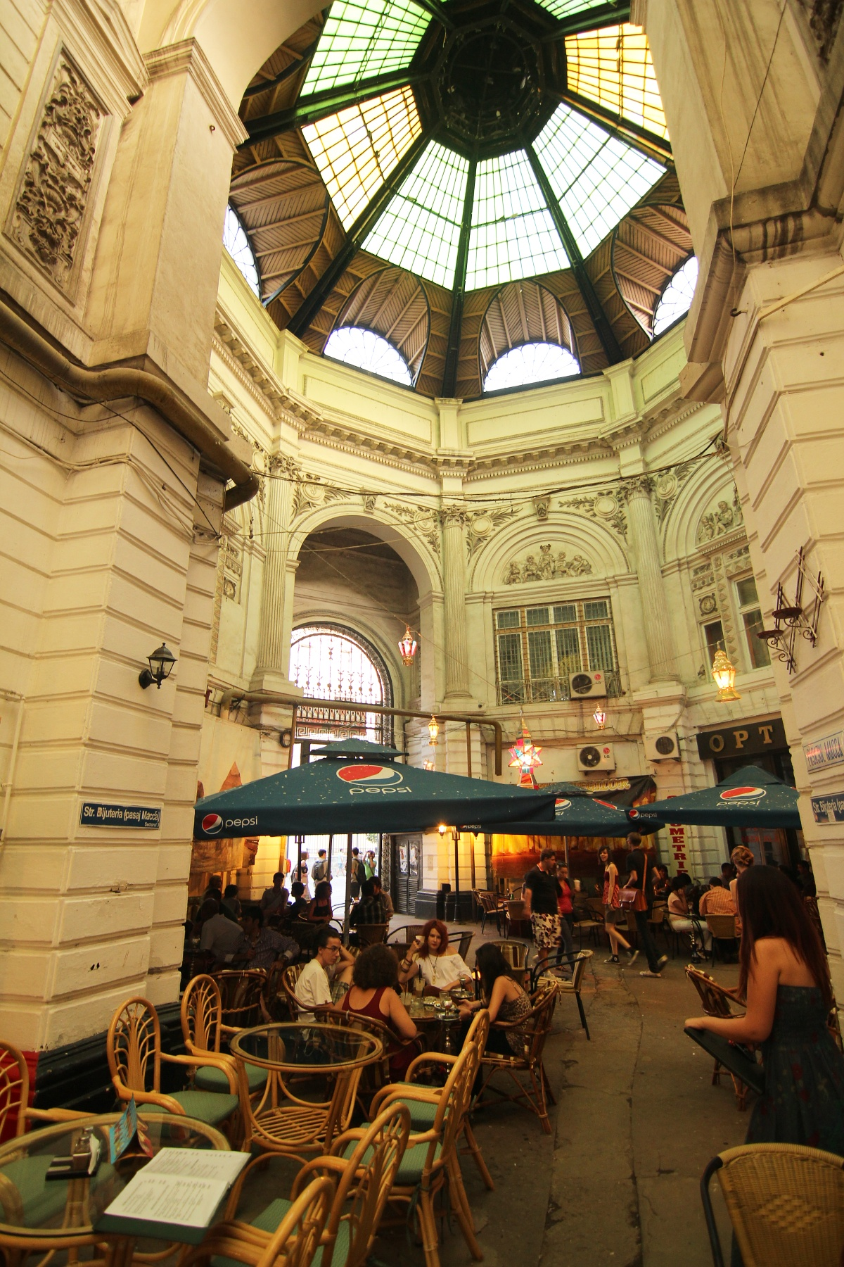 Ansamblul de arhitectură "Pasajul Macca- Villacrosse"